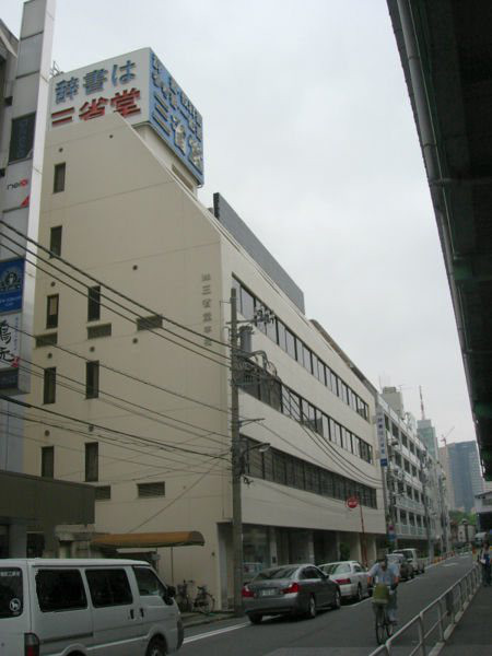 2006年7月、提供者(Nmaeda)が撮影。